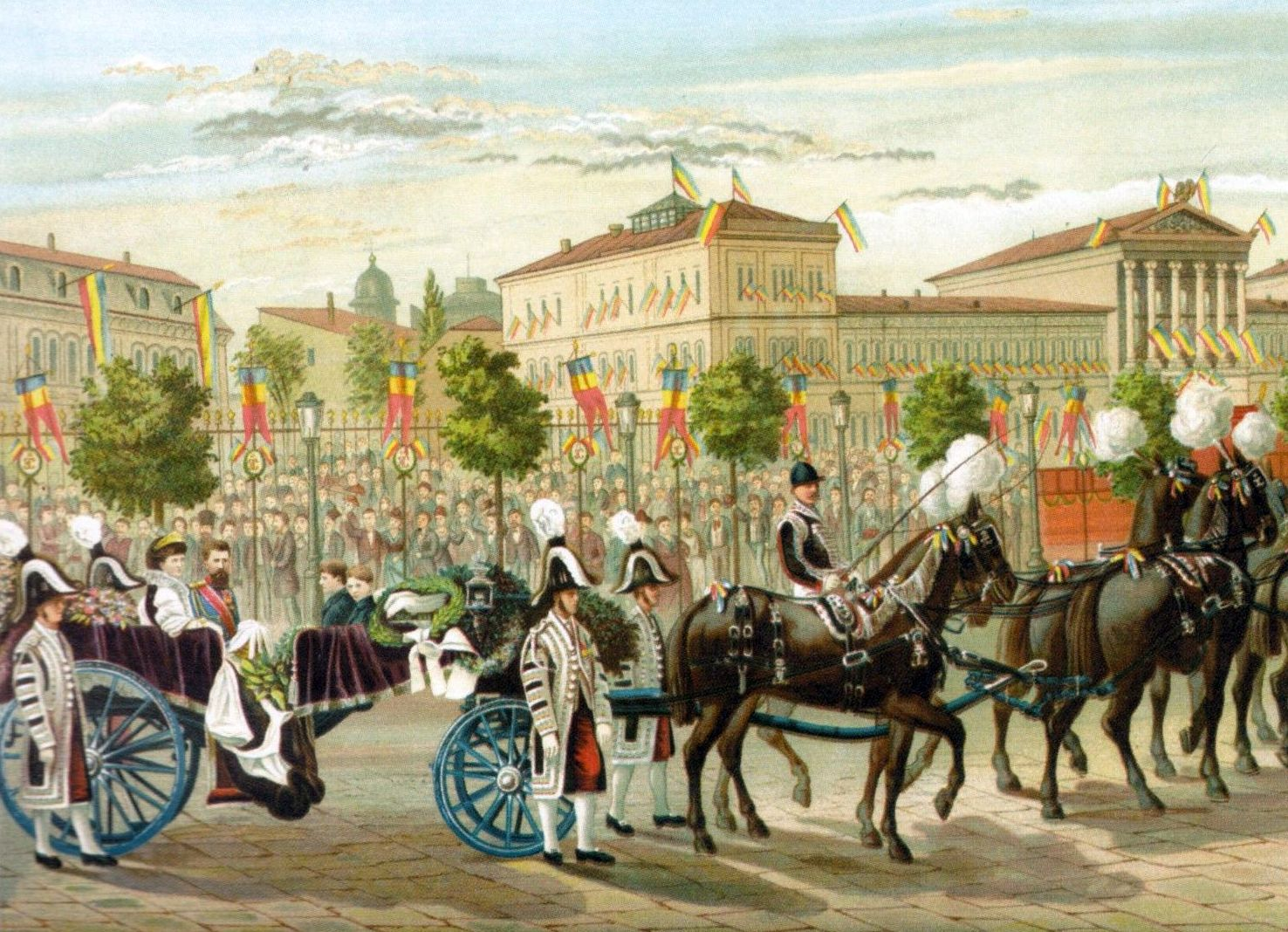 Regina Elisabeta și Principele Wilhelm cu fii săi, cromolithografie din Albumul Carelor simbolice